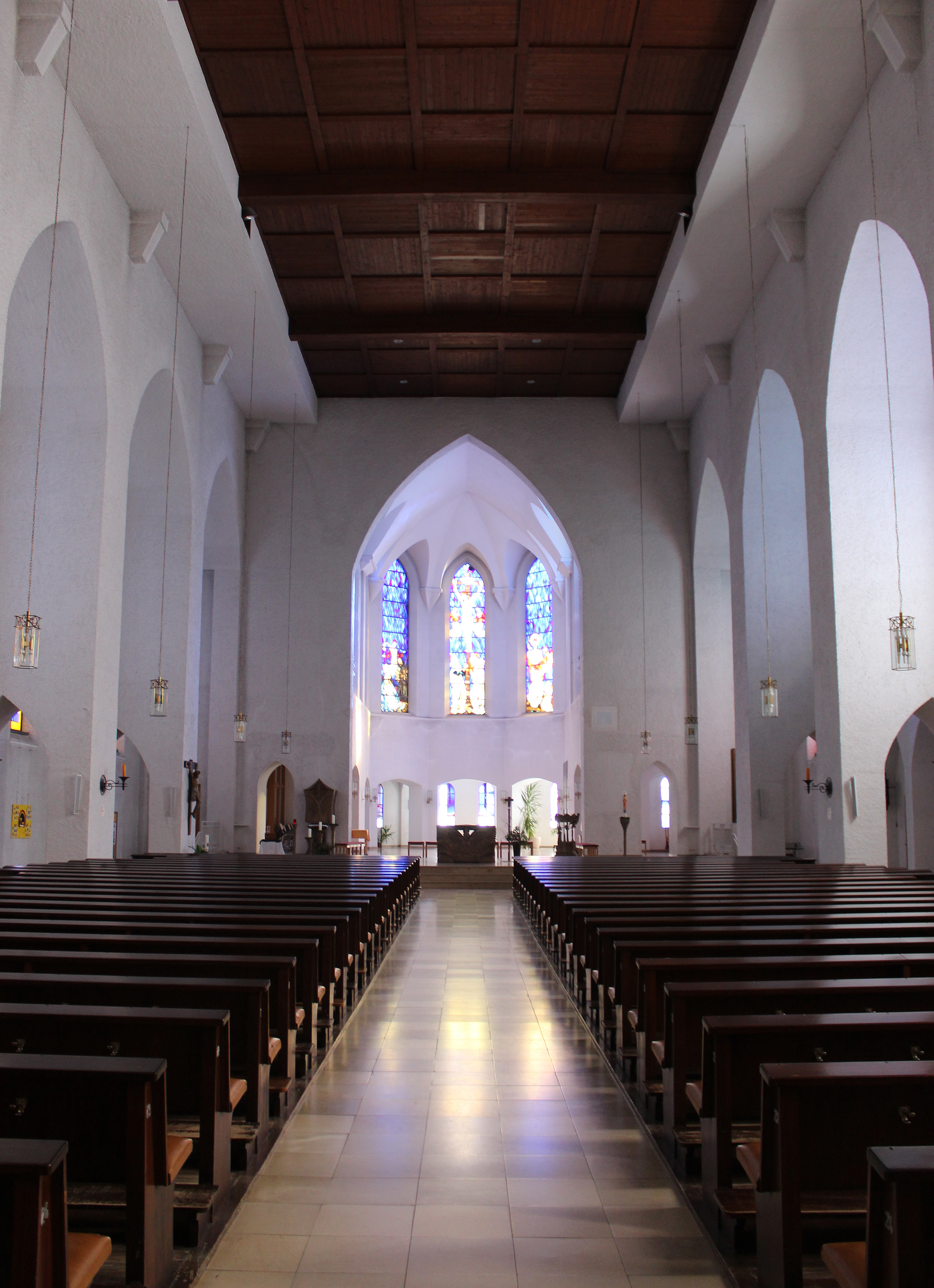 Blick ins Innere der katholischen Pfarrkirche Heilig Kreuz in Zweibrücken, Rheinland-Pfalz.